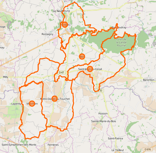 Carte de la commune nouvelle et de ses communes déléguées